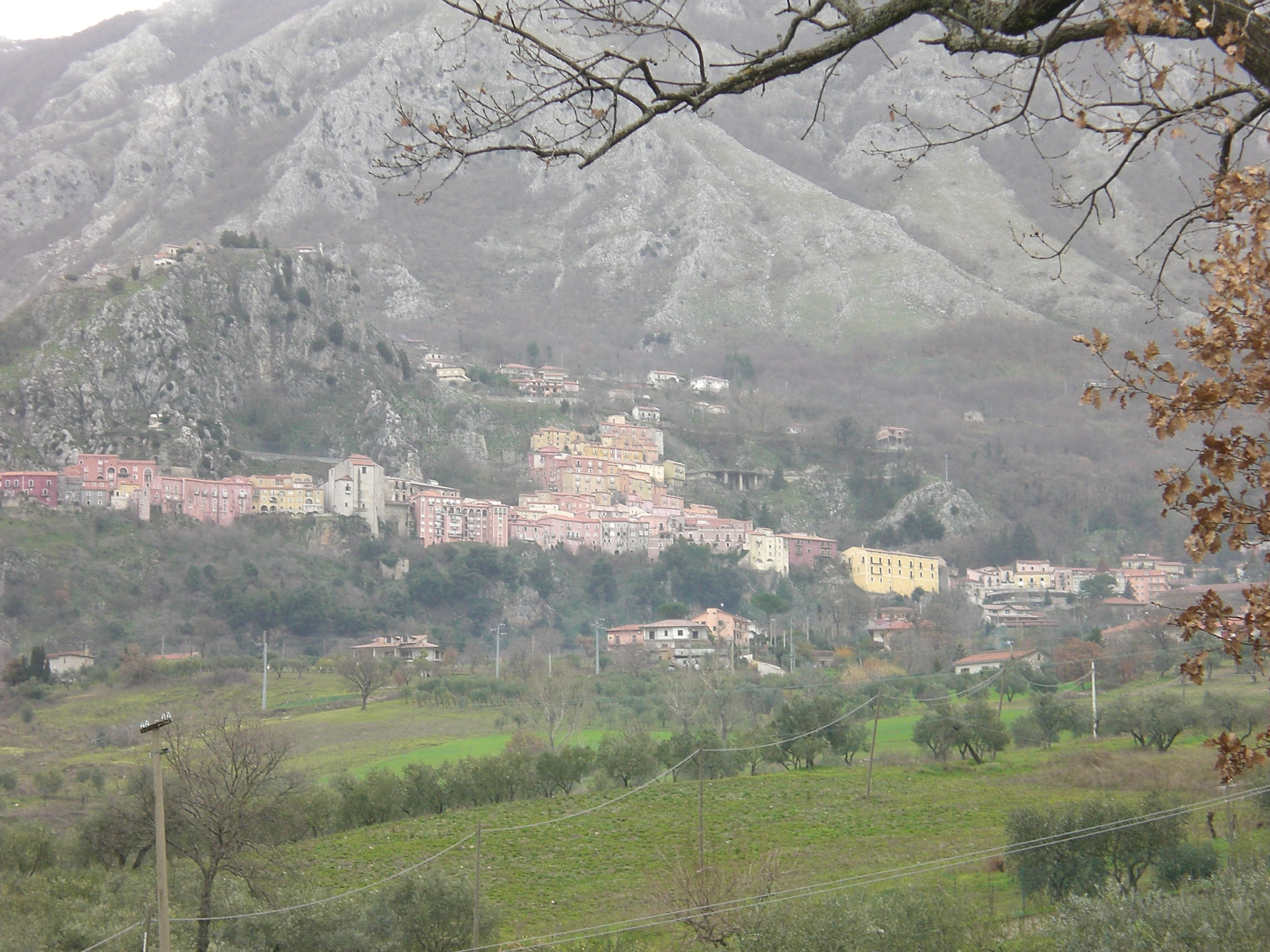 Colliano. Sicilianu: Viduta dâ cità.